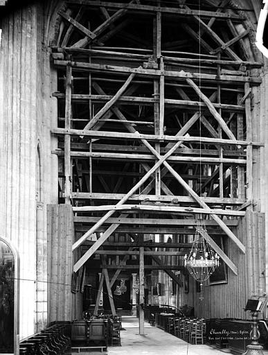 Le transept pendant la restauration après 1885, vue vers l'ouest.